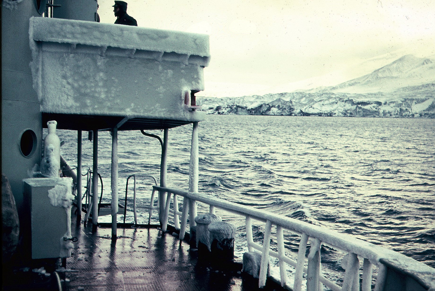 En marzo de 1958 nos enviaron desde Punta Arenas a rescatar al personal de la base antártica chilena Luis Risopatrón que se incendió al mes de ser inaugurada. Pertenecía al Instituto Antártico Chileno y estaba dotada de científicos de las universidades.En la navegación del estrecho de Gerlache tuvimos un temporal de viento y nieve. A bordo del PP 60 Lientur de la Armada de Chile.